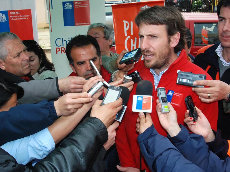 El 9 de septiembre de 2011 se realizó un simulacro de terremoto y tsunami en la comuna de Pichilemu, Chile, que terminó en la evacuación de todas las facilidades públicas (colegios, municipalidad) como método de prevención.